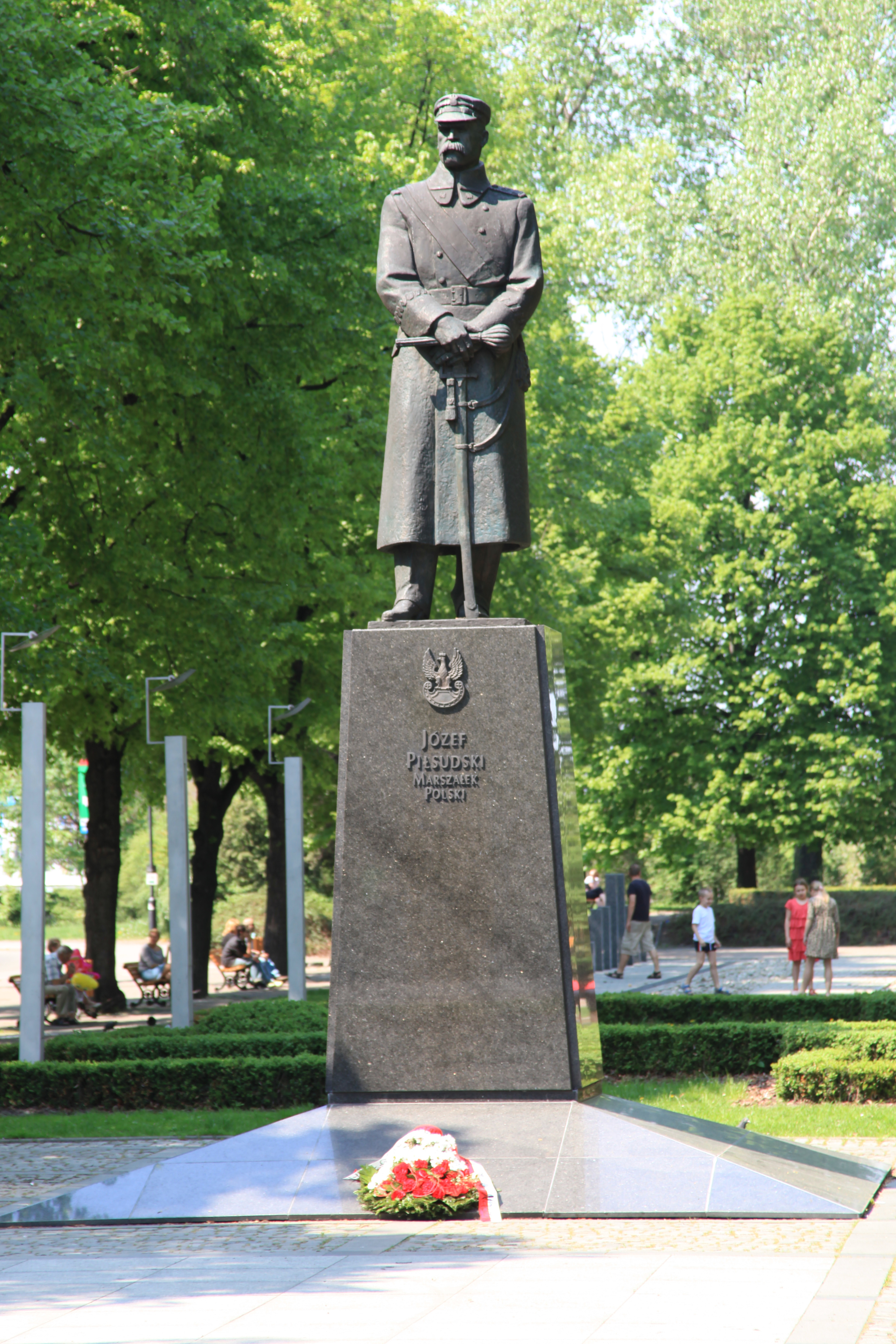 Gliwice